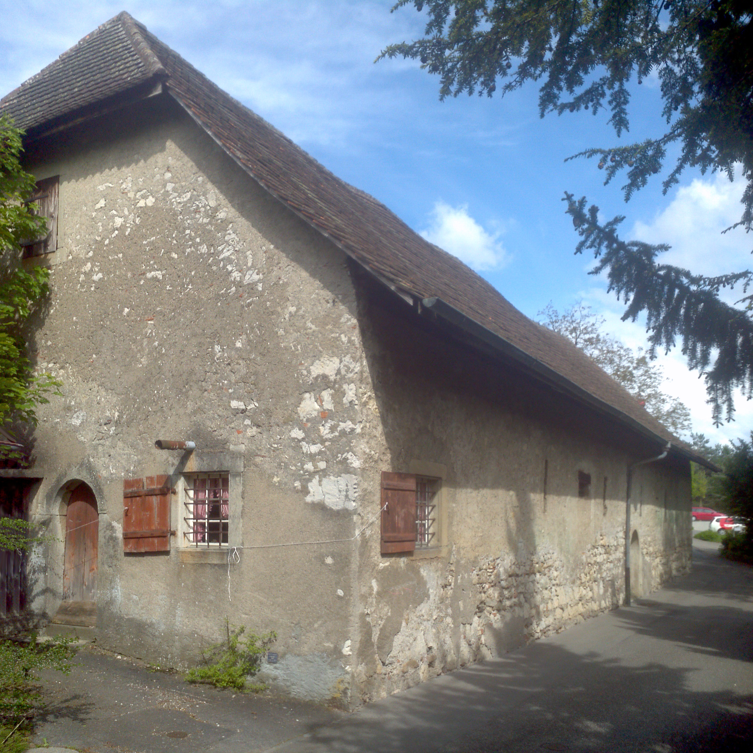 Rote Trotte, Wettingen AG